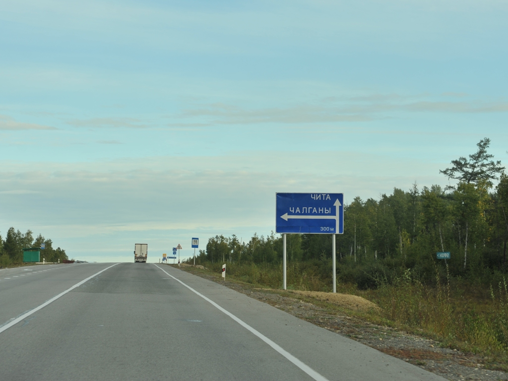 Трасса Амур Р297